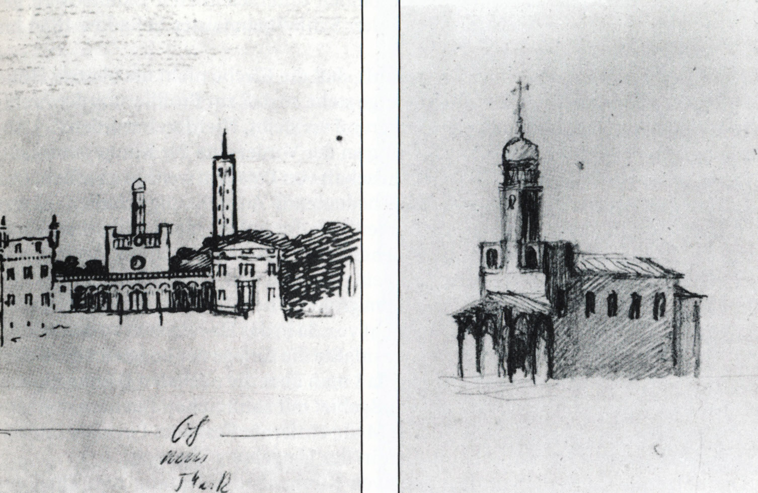 zwei Skizzen Friedrich Wilhelms (IV.) zum Kirchenbau in Nikolskoe